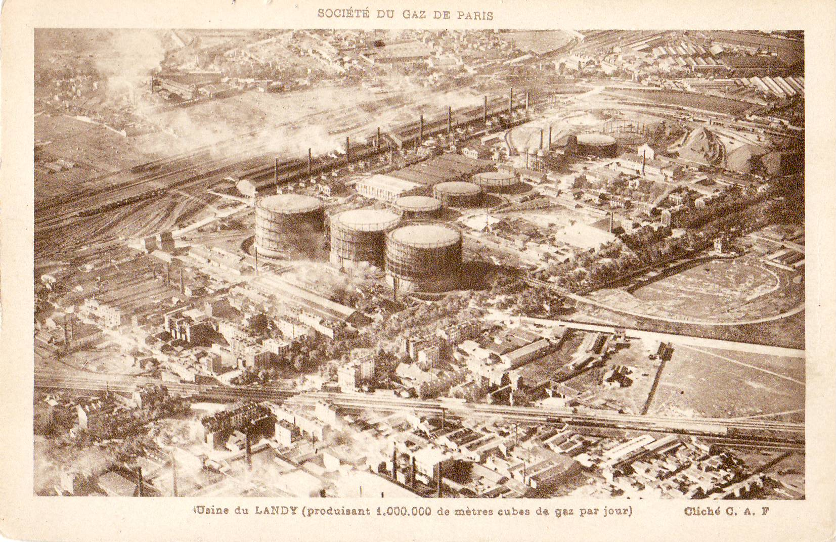 Carte postale ancienne éditée par CAFSociété du Gaz de Paris : Usine du Landy (produisant 1.000.000 m3 de gaz par jour)Ce cliché aérien montre l'usine du Cornillon à la Plaine Saint-Denis (Ville de Saint-Denis), sensiblement à l'emplacement de l'actuel Stade de France Au premier plan, la ligne de chemin de fer Paris Soissons, au second plan à gauche, la ligne Paris - Lille, et, à droite, le Canal Saint-Denis